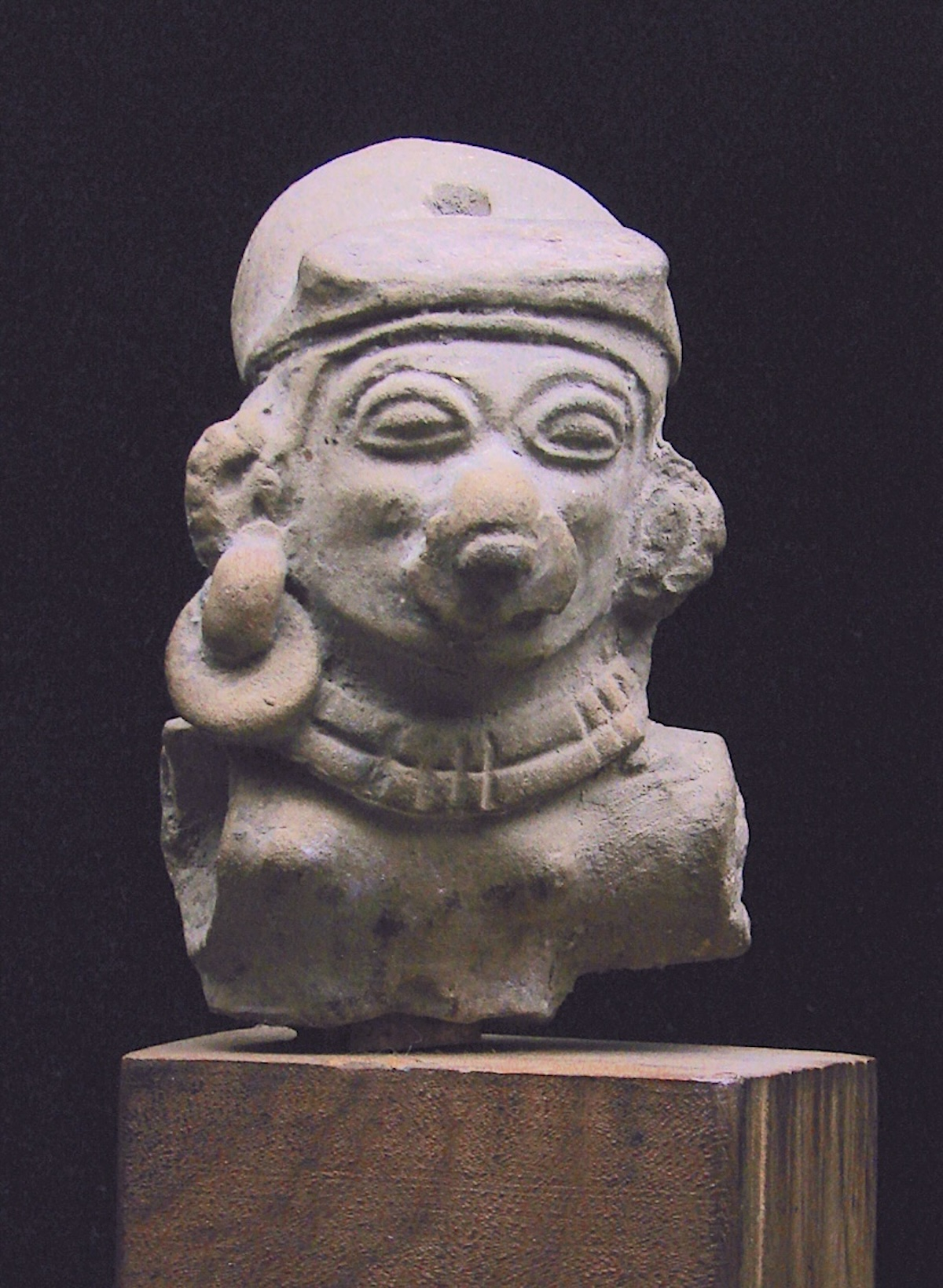 Statuette de la culture Chorrera (1800 - JC / 300 + JC).Musée d'Auch.